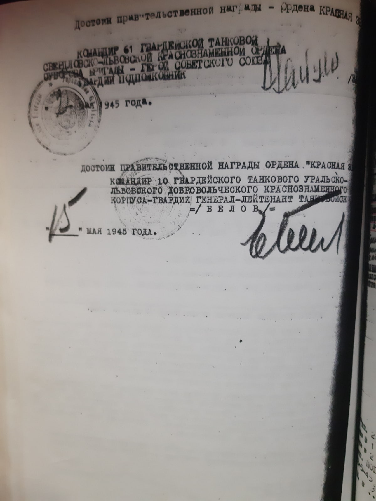 Копия наградного листа на орден Красного Знамени